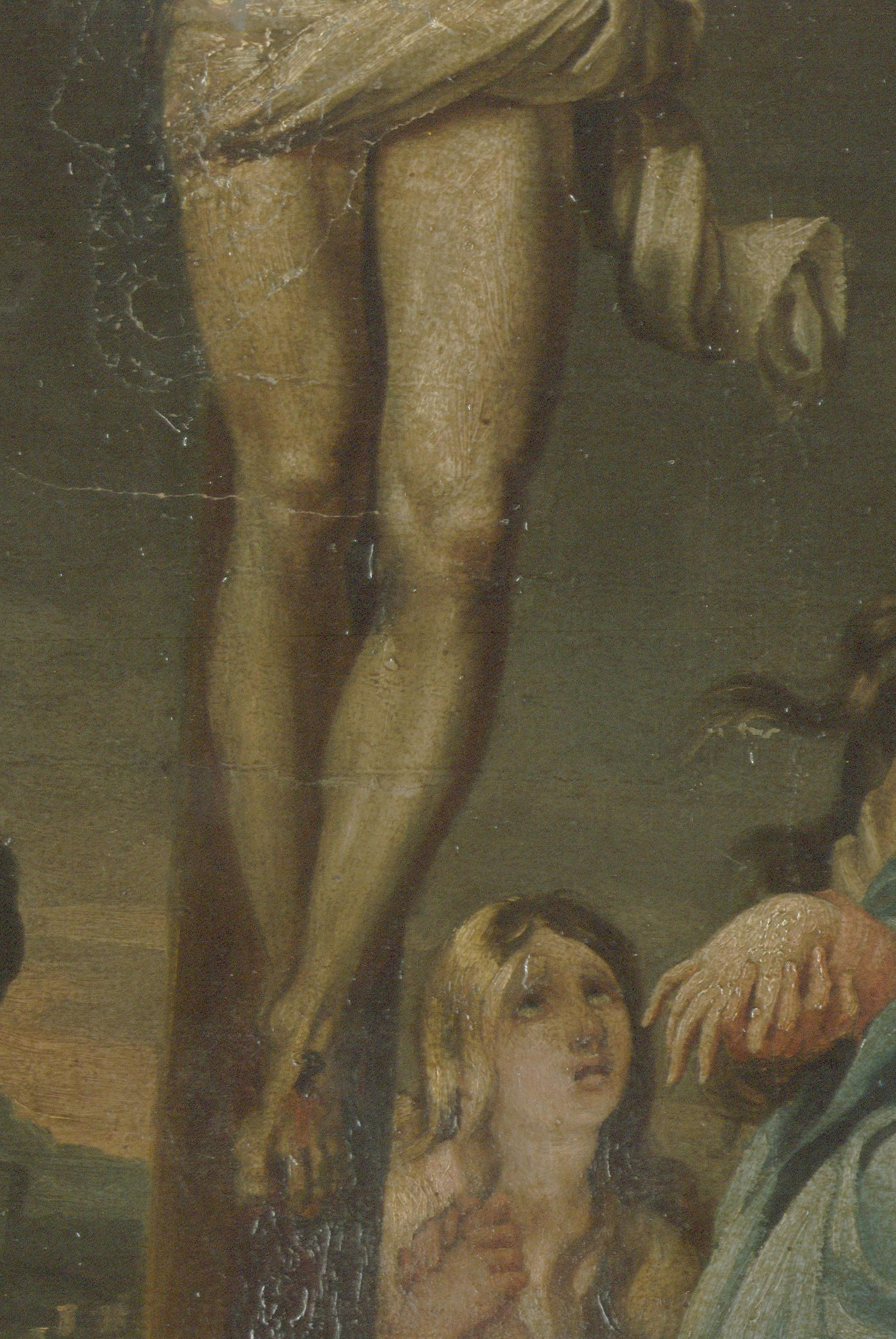 Doek uit eigen privé-collectie, info contact; Carolus